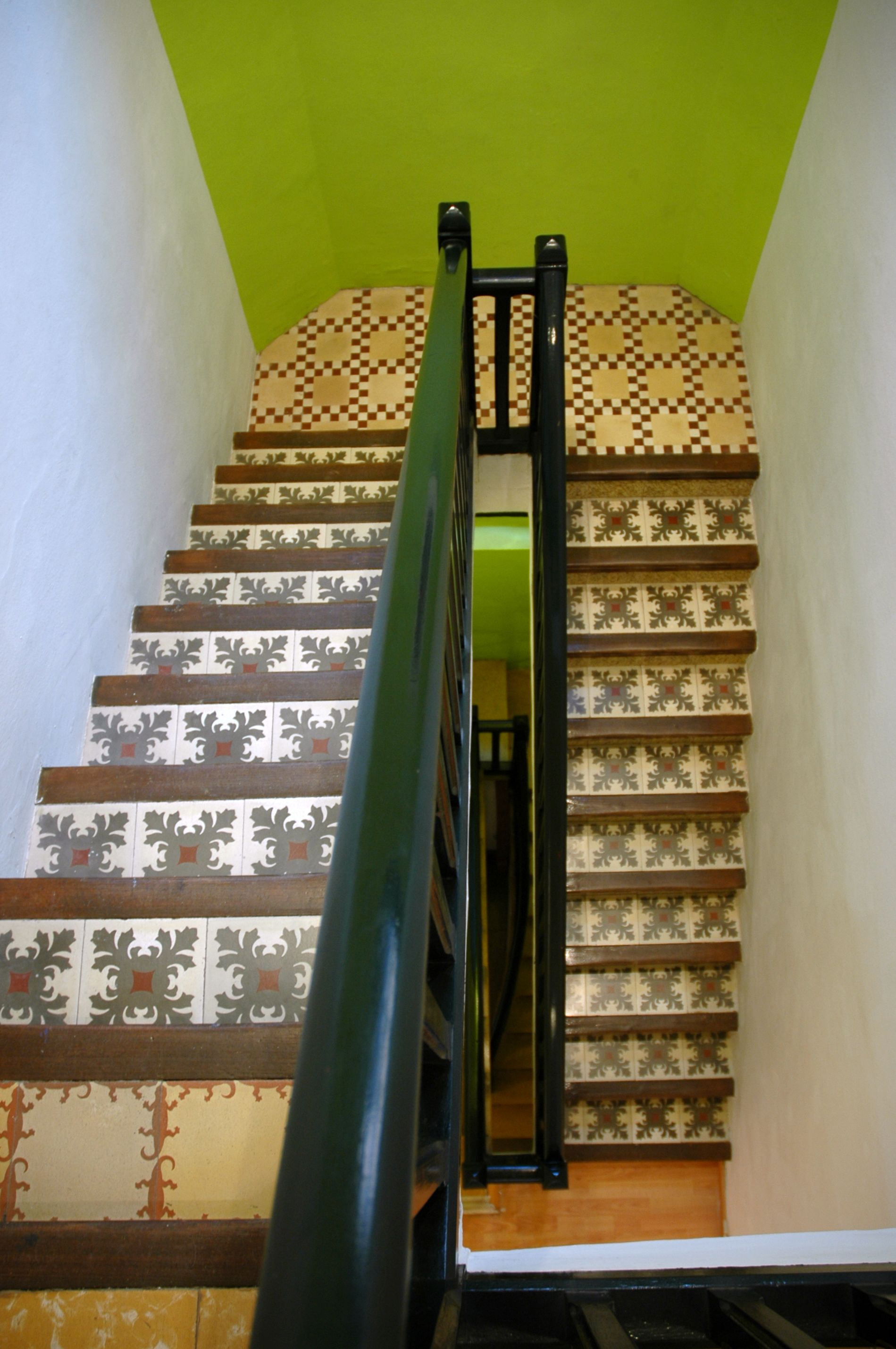 Blanes - Casa Burcet - Detall escala